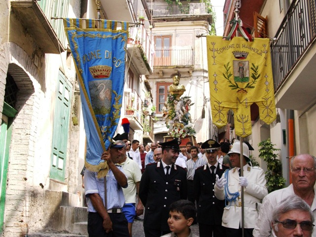 Autore: Gino Larosa OTRS: 2008021510007787